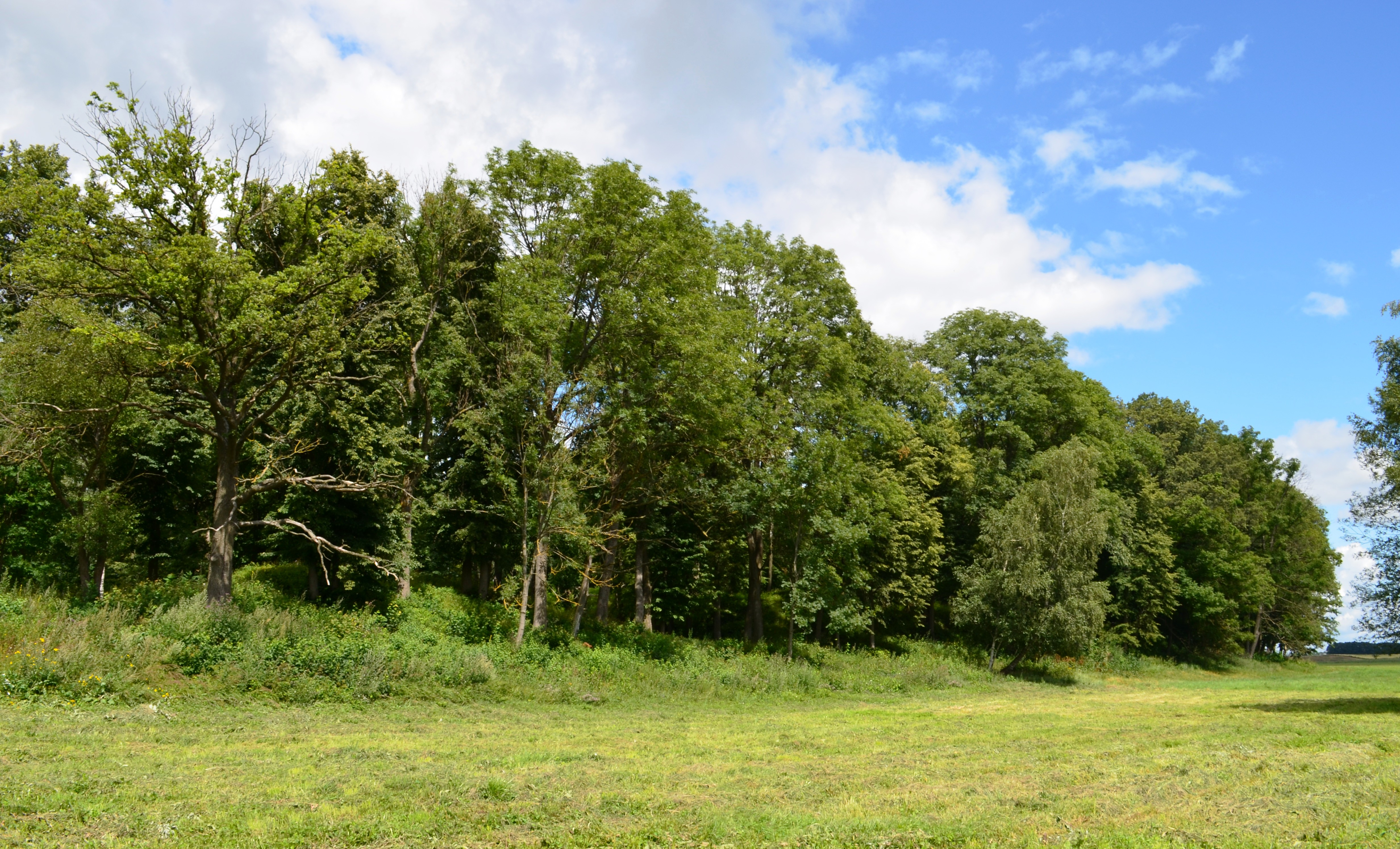 Čičinsko kalnas, Upytė, Panevėžio raj.